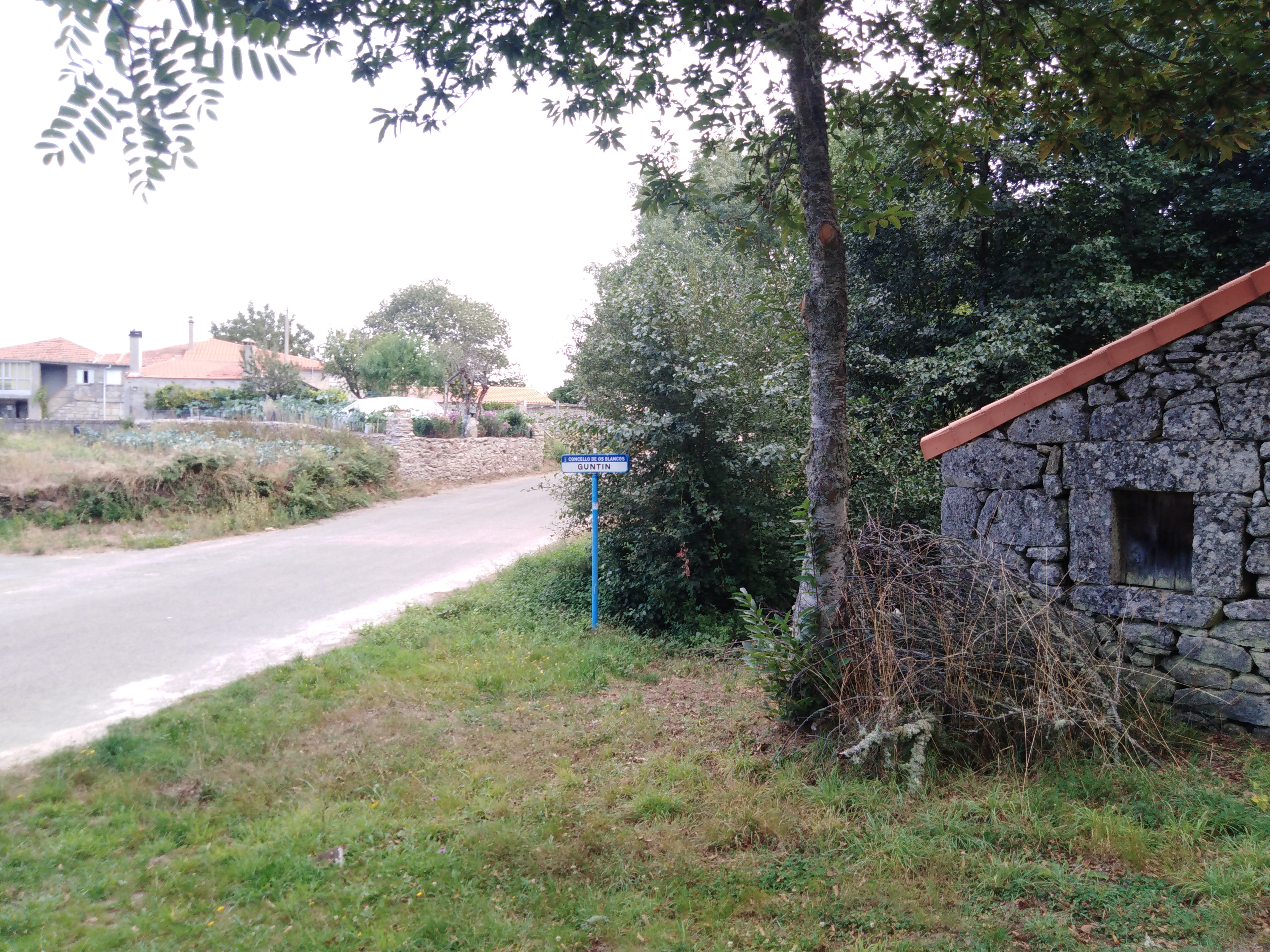 Vista da aldea de Guntín (Os Blancos)